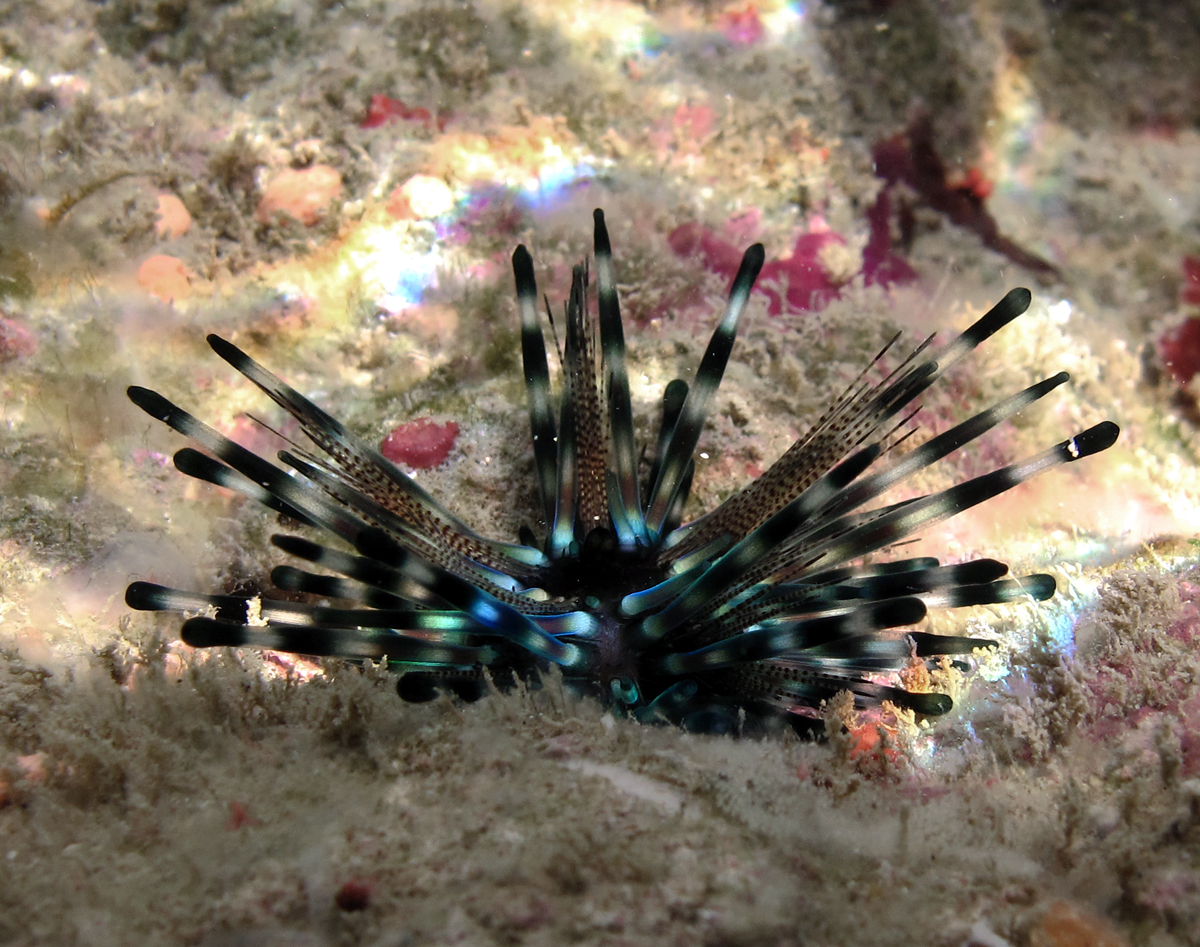 Jeune oursin Echinothrix diadema à la Réunion.